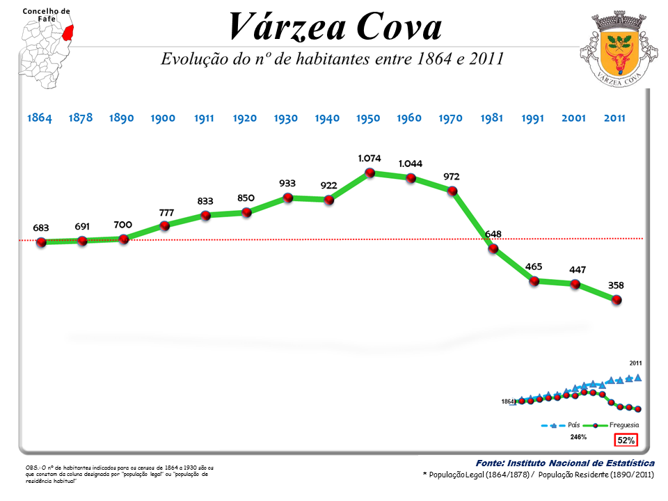 Censos 1864/2011